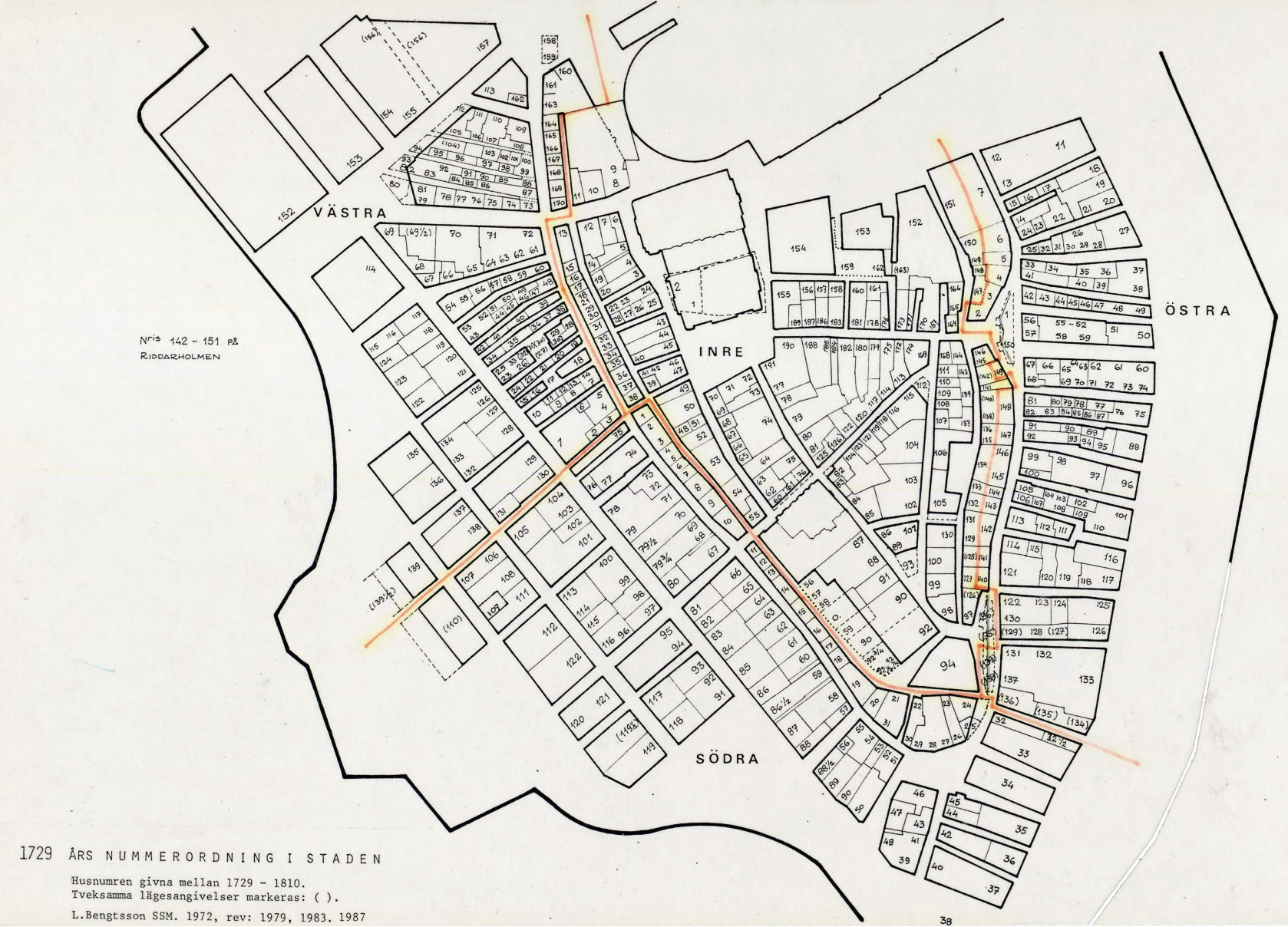 Kartan visar kvarter i Gamla stan och är en sammanställning av de tomtnummer som användes mellan 1729 - 1810. Staden är uppdelad i distrikt (inre, södra, västra och östra). Därefter är husen inom varje distrikt löpande numrerade, gata upp och ner.